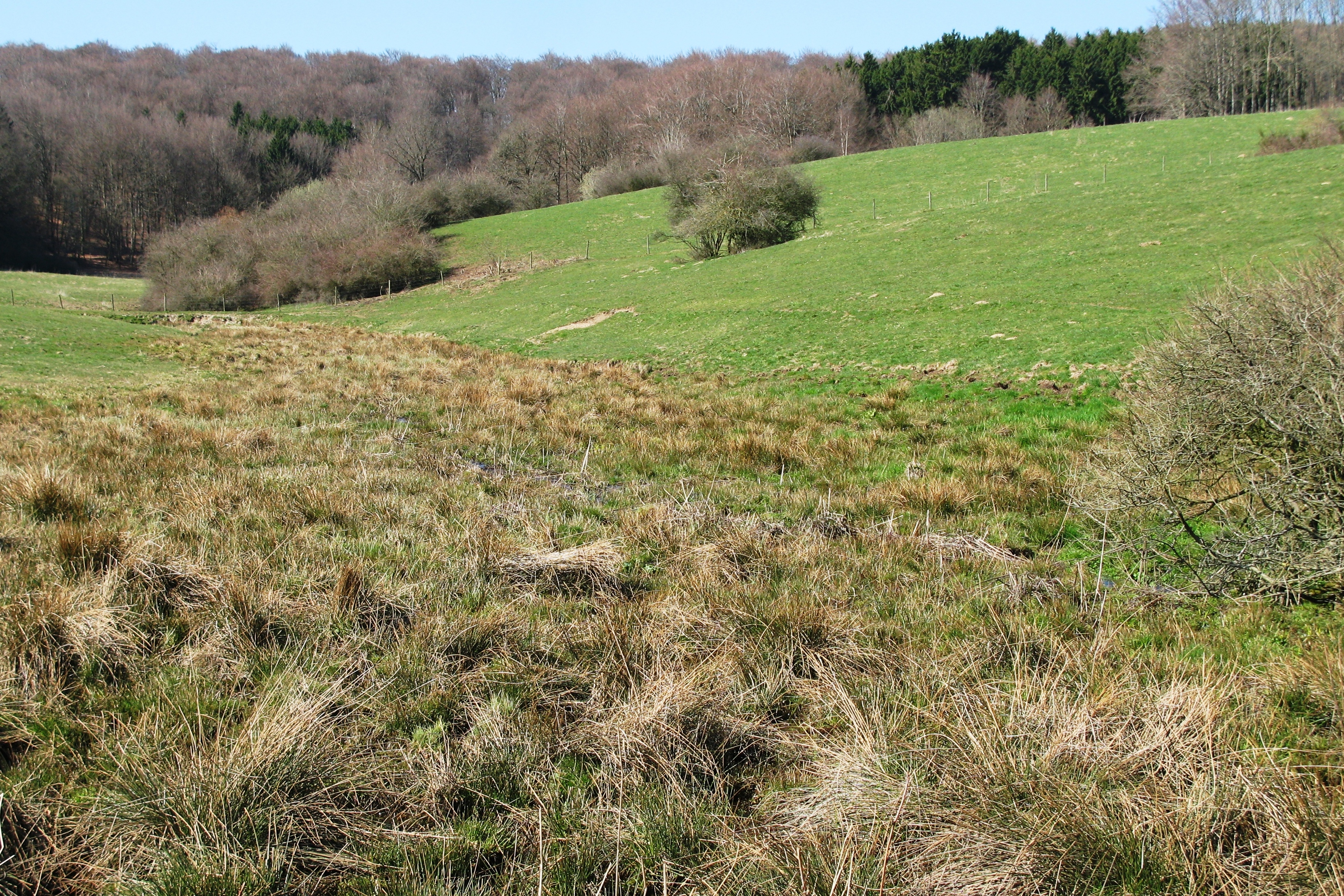 Quellgebitt vun der Foulschterbaach no Norden gekuckt.